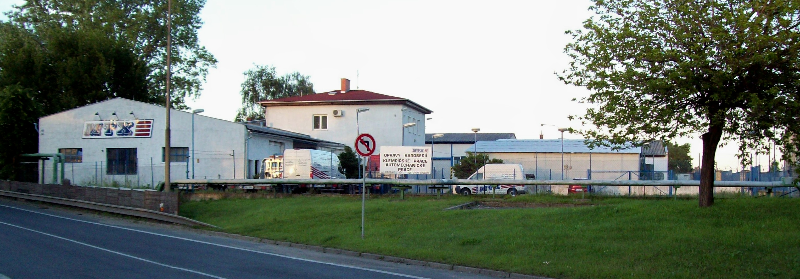 MTX Mělník, ul. Řipská 874, 276 01 Mělník. (MTX = Metalex)